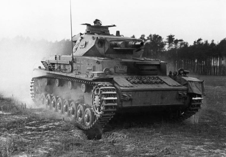 Scherl Bilderdienst Ausbildung bei der Panzergrenadier-Division "Großdeutschland", die sich überwiegend aus Freiwilligen aus allen Gauen des Reiches zusammensetzt und die im Verlaufe dieses Krieges unsterblichen Ruhm an ihre Fahnen geheftet hat. Besonders sorgfältig und vielseitig ist die Ausbildung des Ersatzes für diese Kerntruppe, die bei der Ersatzbrigade "Großdeutschland", dem Heimattruppenteil der ruhmreichen Division, erfolgt. UBz.: Panzer-Pionier im Deckungsloch, Jeder der jungen Rekruten muss sich bei den Übungen, wie es im Ernstfall oft geschieht, vom Panzer überrollen lassen. So gewöhnt man die Soldaten, dem anrollenden Panzer ruhig entgegenzusehen und im richtigen Augenblick zur Nahbekämpfung anzusetzen. Die erprobte Form des Deckungsloches ermöglicht das Ausweichen nach allen Angriffsrichtungen. Foto. Schwahn 5.11.43 5558-43 Information added by Wikimedia users.EN translation: Training to avoid being run over by tanks Scherl Photo Service - Training for the Panzer Grenadier Division "Gross Deutschland", made up for the most part of volunteers from every province of the Reich [deleted]. Particular care and comprehensive training of replacements is done for this core group, which will reinforce the regular troops of the glorious Division. Shown here: A panzer combat engineer in a foxhole, which each recruit has to practice, [deleted], to avoid being run over by tanks. This allows soldiers to get used to calmly look at an approaching tank and move at the right time in combat. The tested shape of cover hole allows evasion to all directions of attack. (Germany, training for the replacement brigade of Panzer Grenadier Division "Gross Deutschland", Panzer IV overrunning a foxhole) [Note - "[deleted]" indicates unimportant parts not translated. The foxhole mentioned is located below the front track]